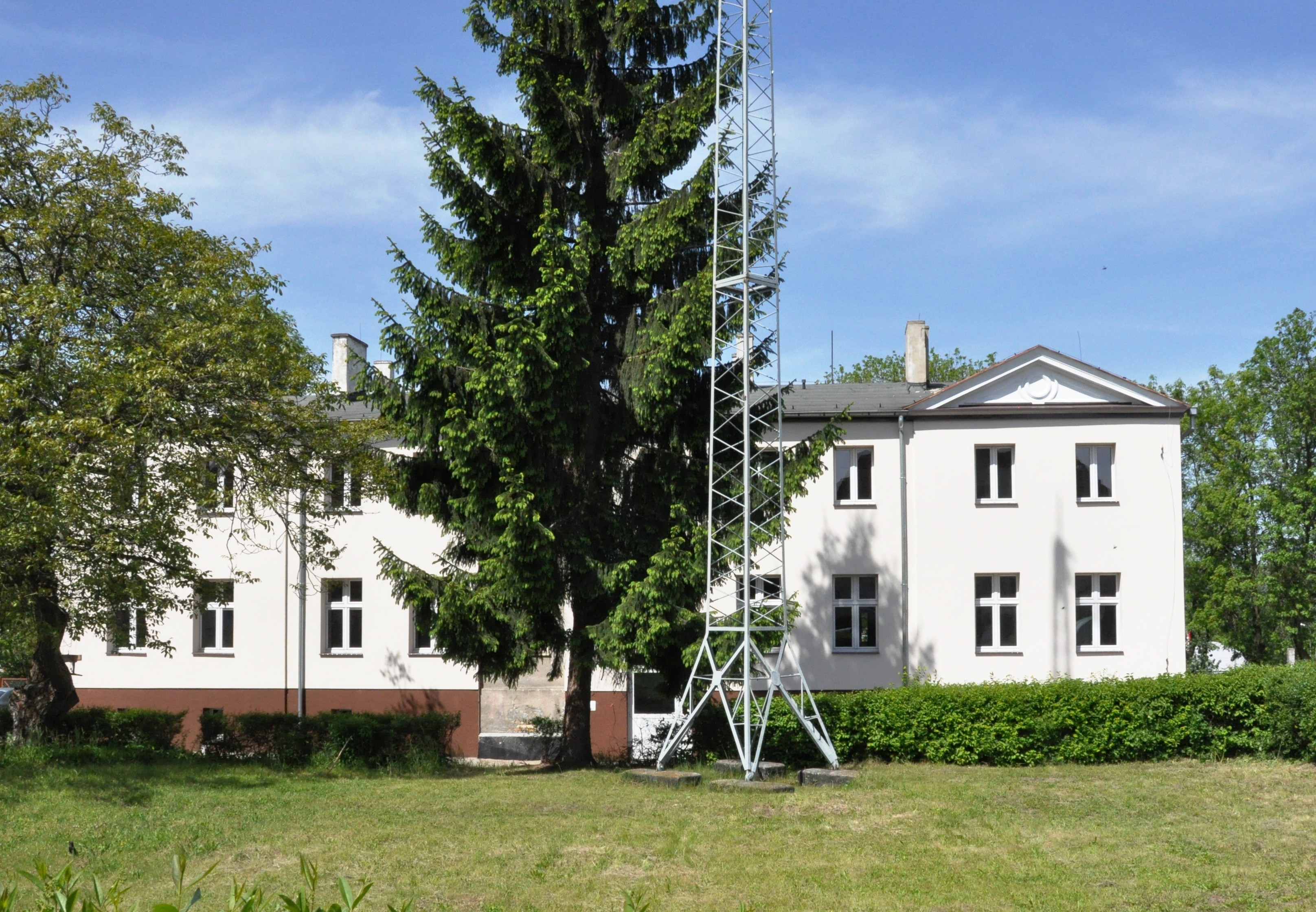 Tu stacjonowała strażnica WOP w Gryfinie